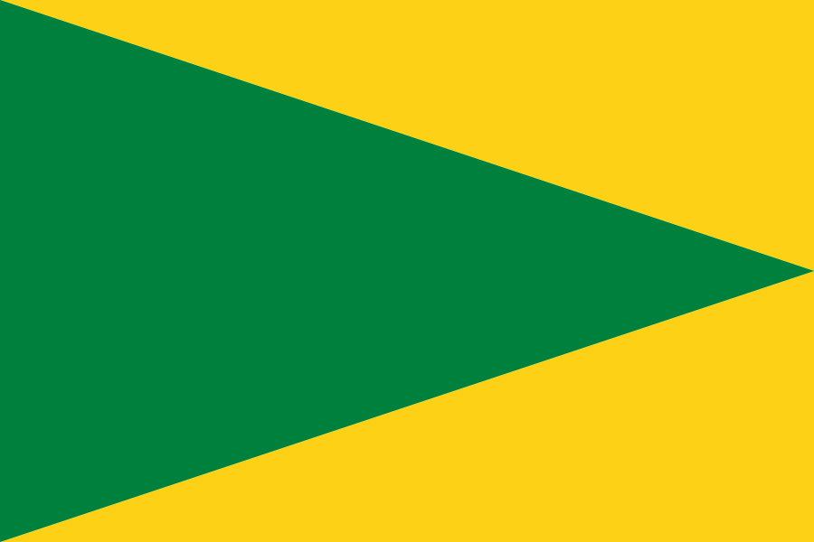 Bandera del Cantón San Juan Bosco